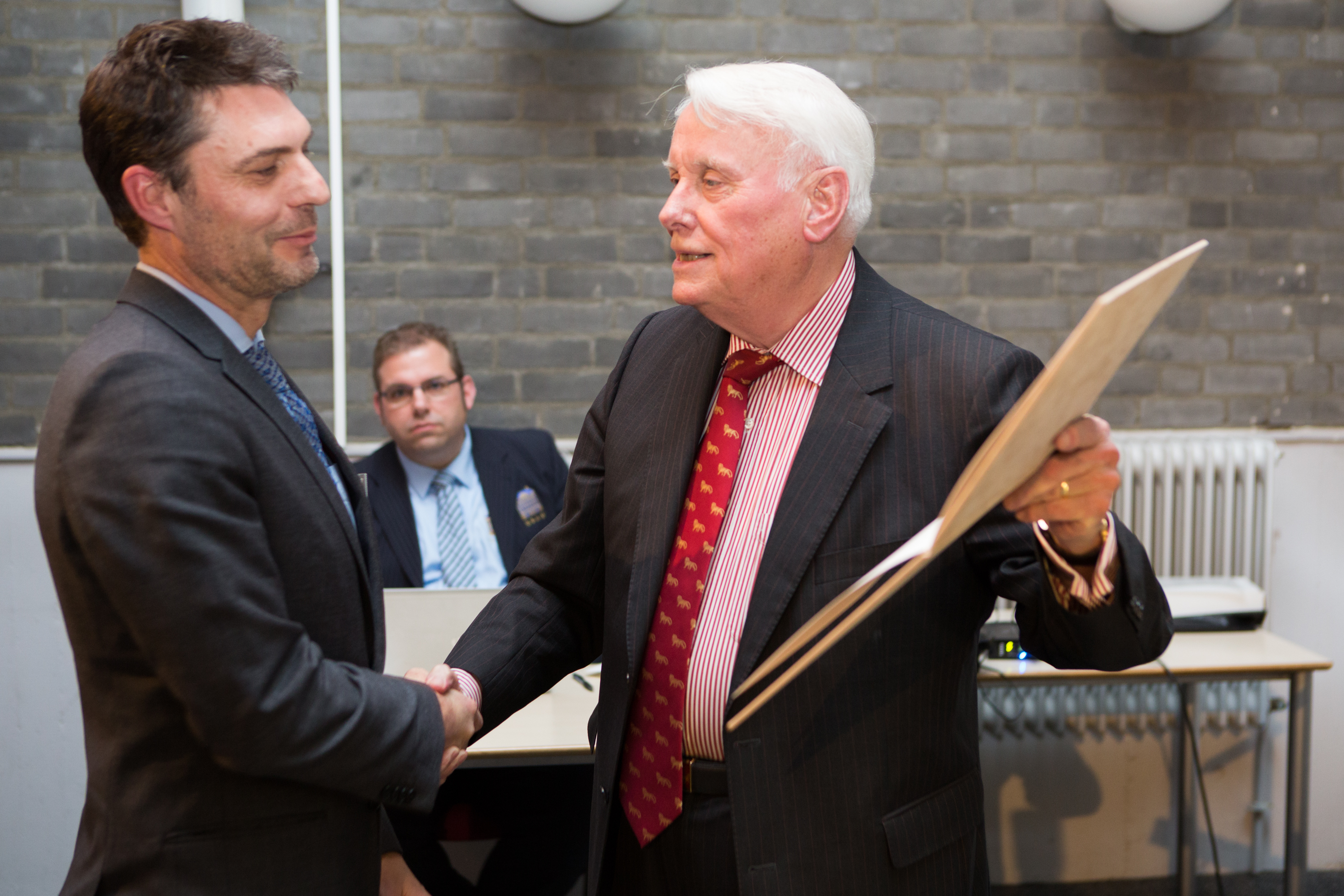 Carsten de Dreu, hoogleraar arbeids- en organisatiepsychologie aan de Universiteit van Amsterdam, ontvangt de Dr. Hendrik Muller Prijs voor de gedrags- en maatschappijwetenschappen 2015. Hij krijgt de prijs voor zijn gehele oeuvre. De Dreu doet onder meer onderzoek naar samenwerking en conflicthantering binnen groepen, en naar creativiteit en innovatie. Zie ook: Foto v.l.n.r. Carsten de Dreu en Sijbren Cnossen Fotograaf: KNAW/Inge Hoogland For information in English, see